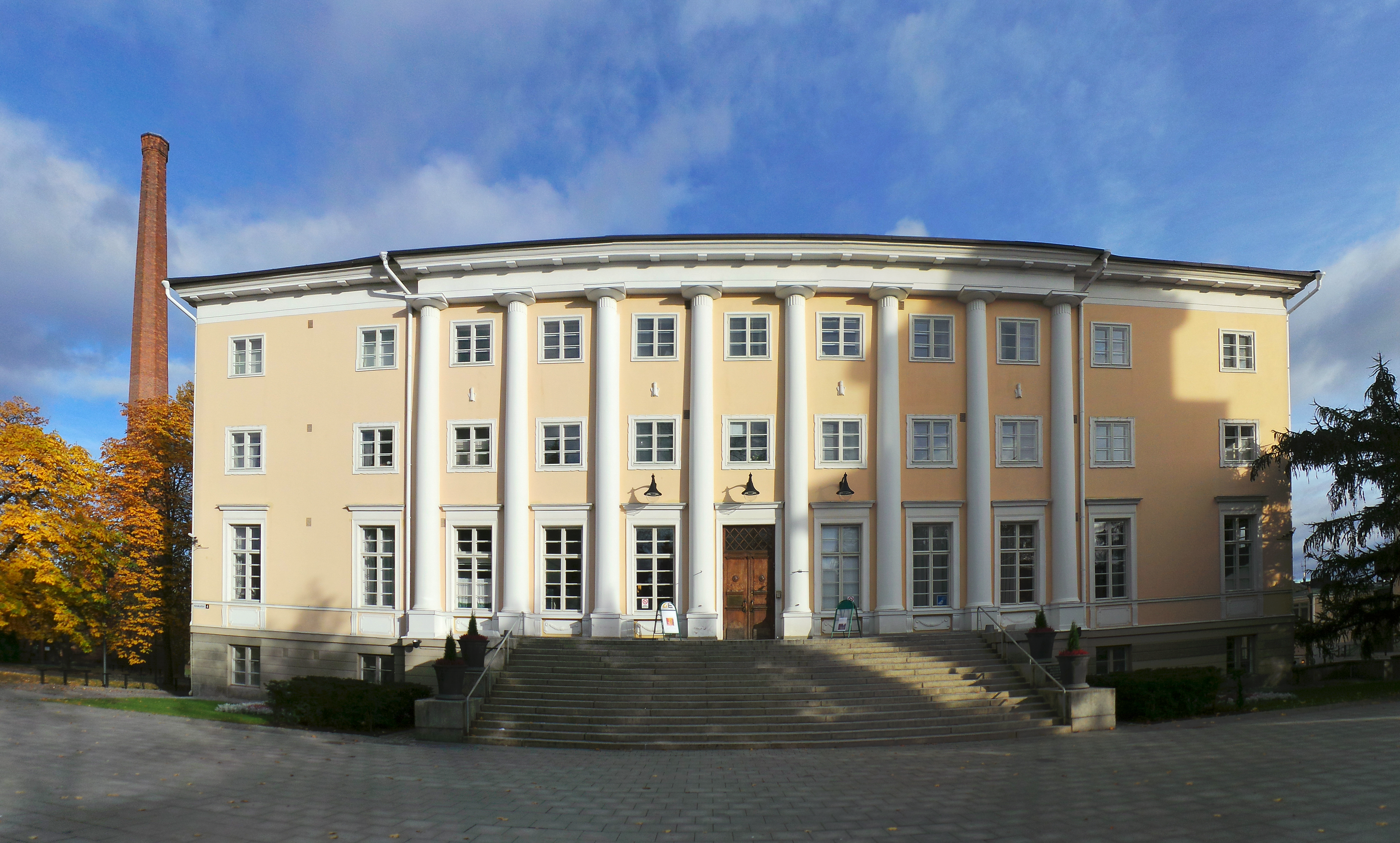 Vanha kirjastotalo